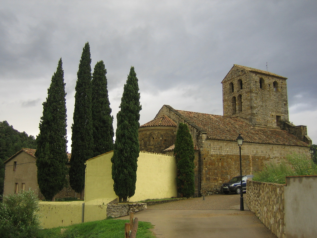 Església romànica del segle XI